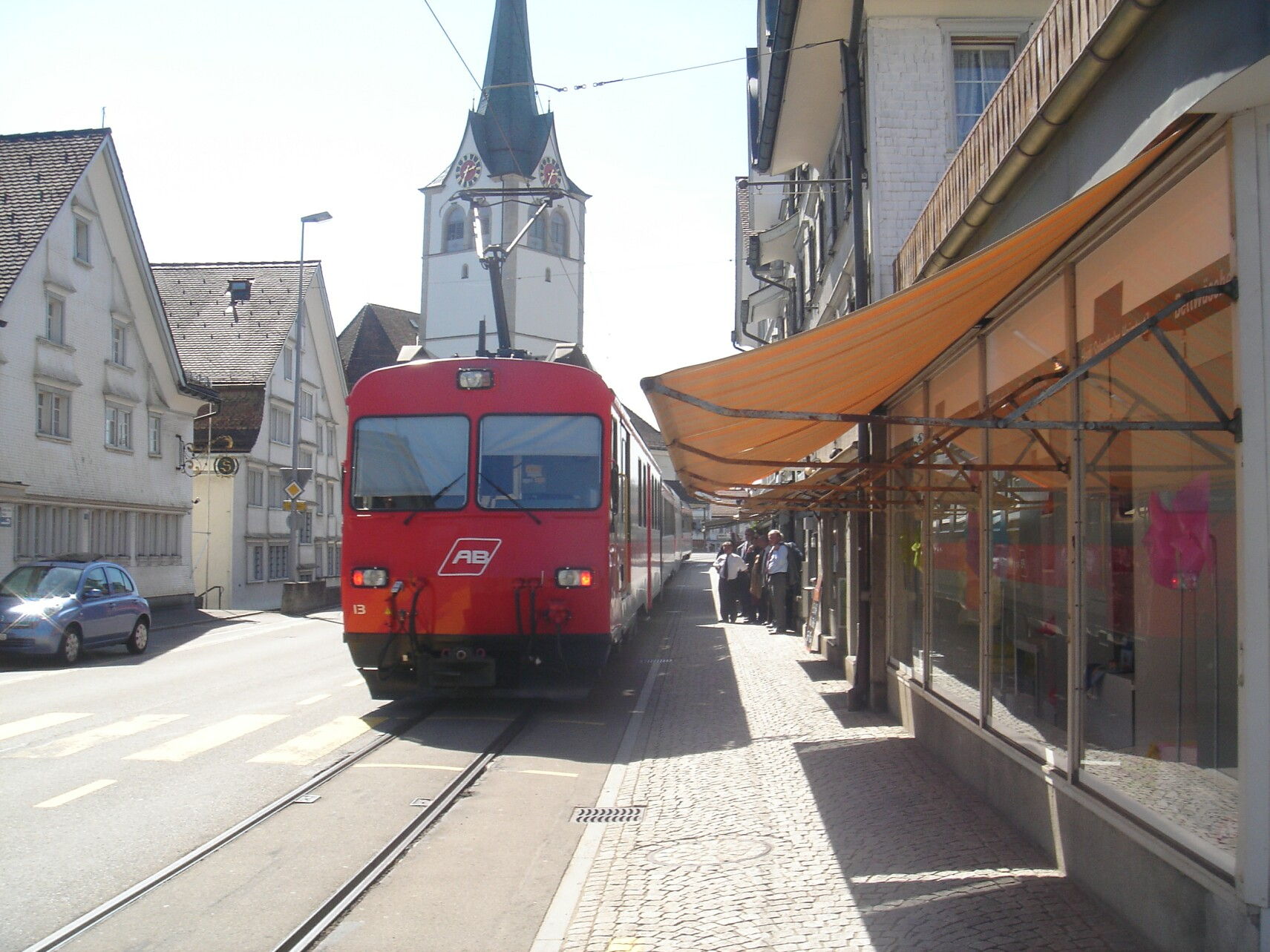 Zug der Appenenzellerbahn (Gaiserbahn) in Teufen.